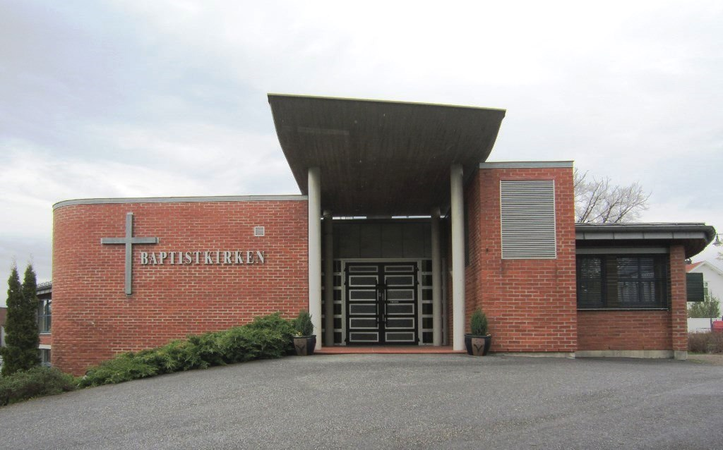 Baptistkirken i Skien